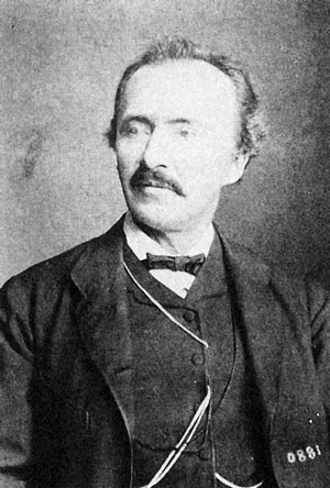 Heinrich Schliemann was 68 toen hij stierf in 1890: op de foto is hij naar ruwe schatting tussen de 40 en 60 jaar oud.